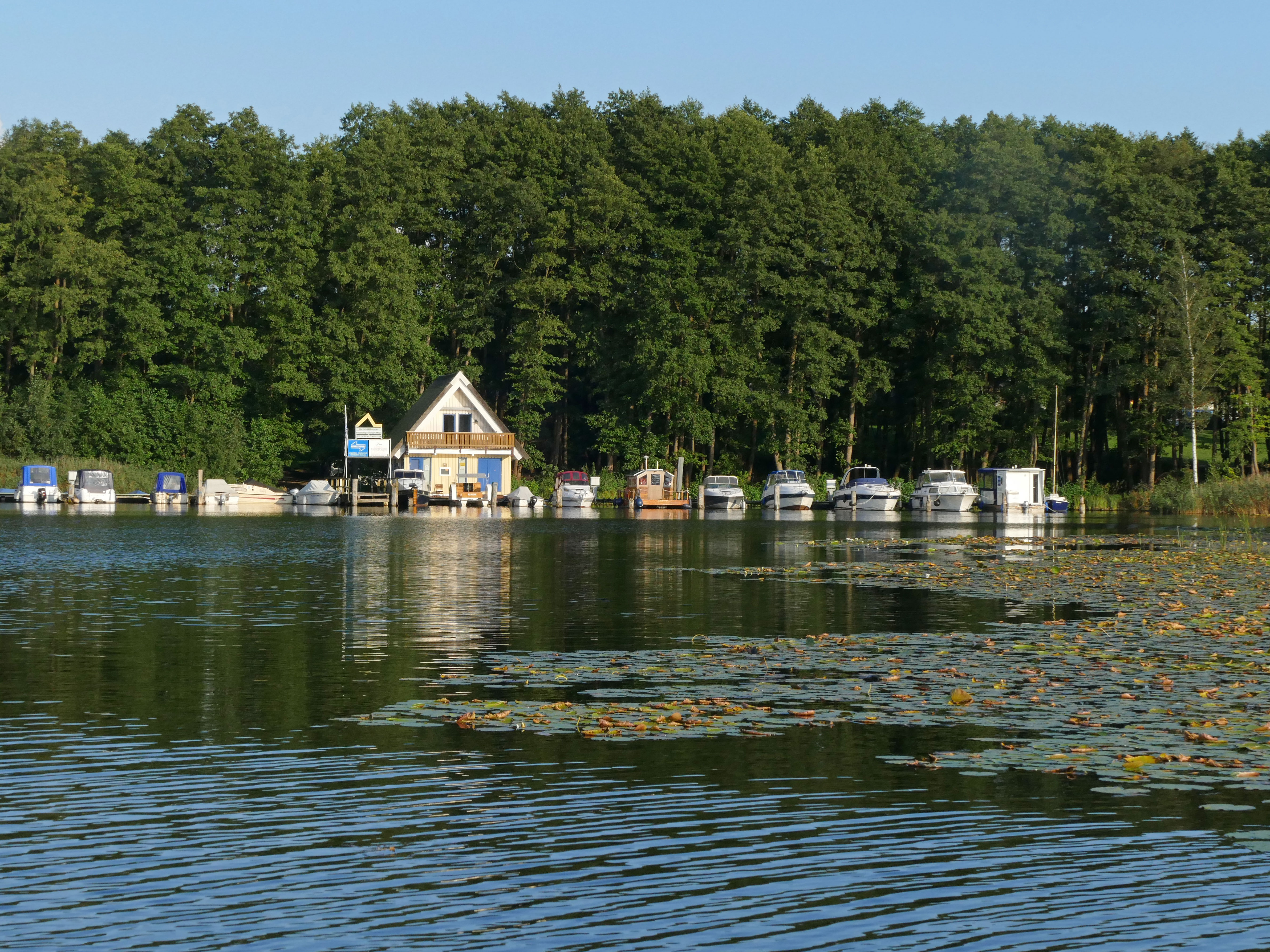 Boots-Anleger Mini-Marina am Grazower Möschen mit Seerosen